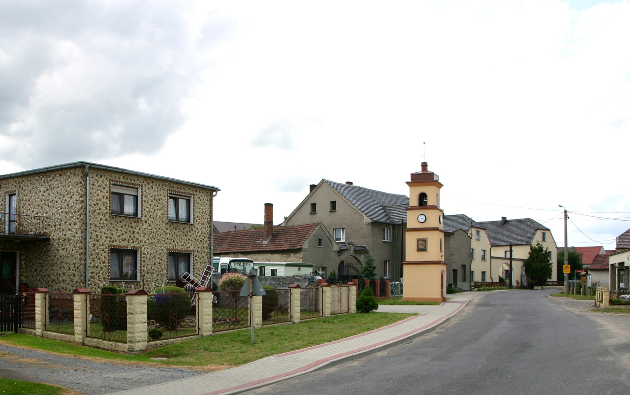 Grocholub (dodatkowa nazwa w j. niem. Grocholub) – wieś w Polsce położona w województwie opolskim, w powiecie krapkowickim, w gminie Walce.